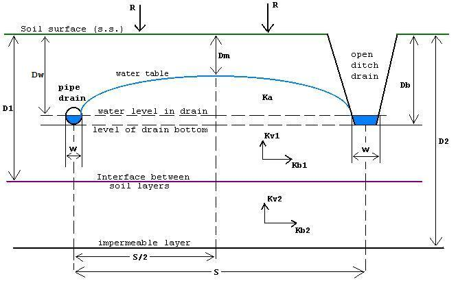 Drainage of anisotropoc soil